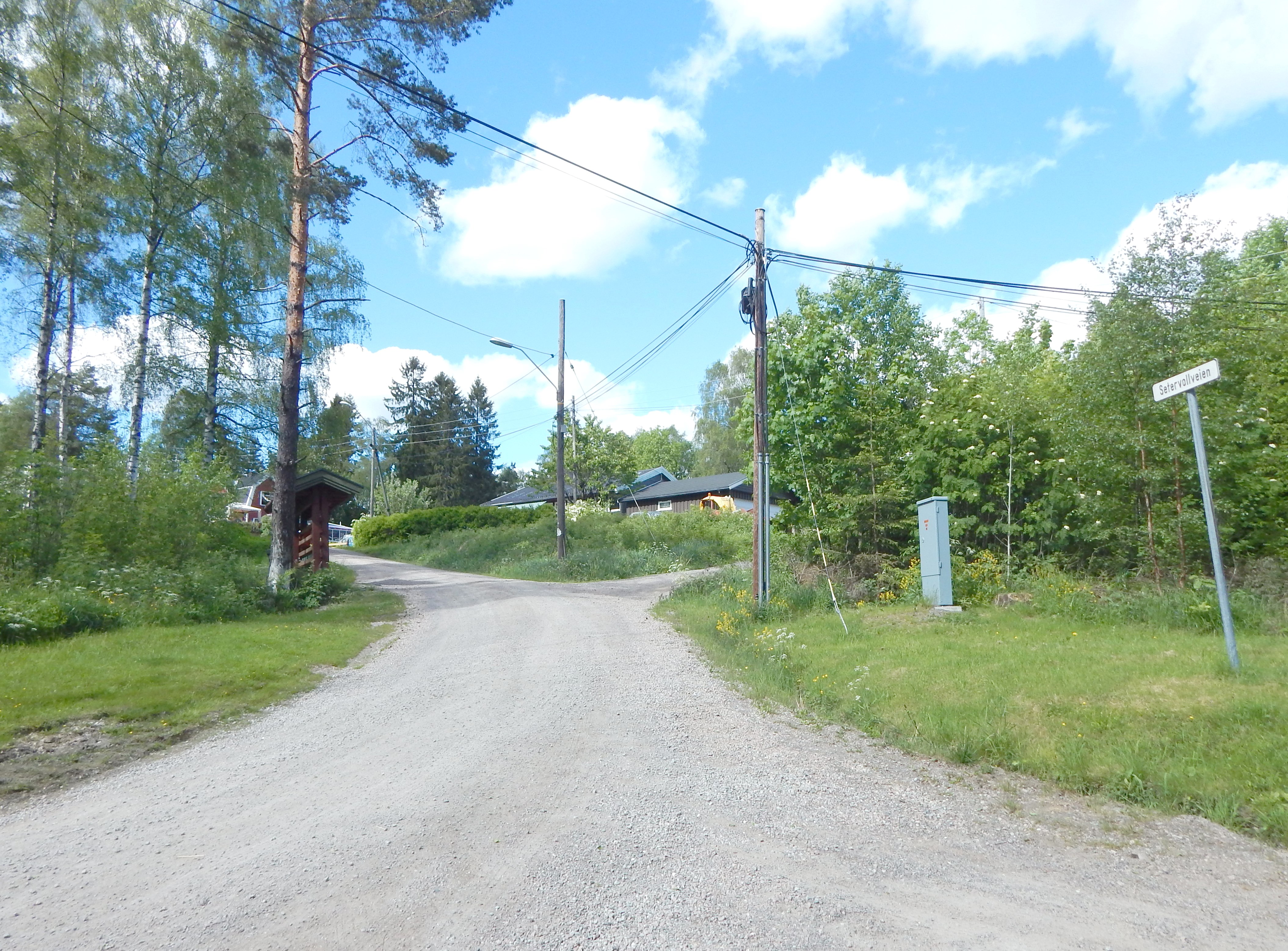 Setervollveien